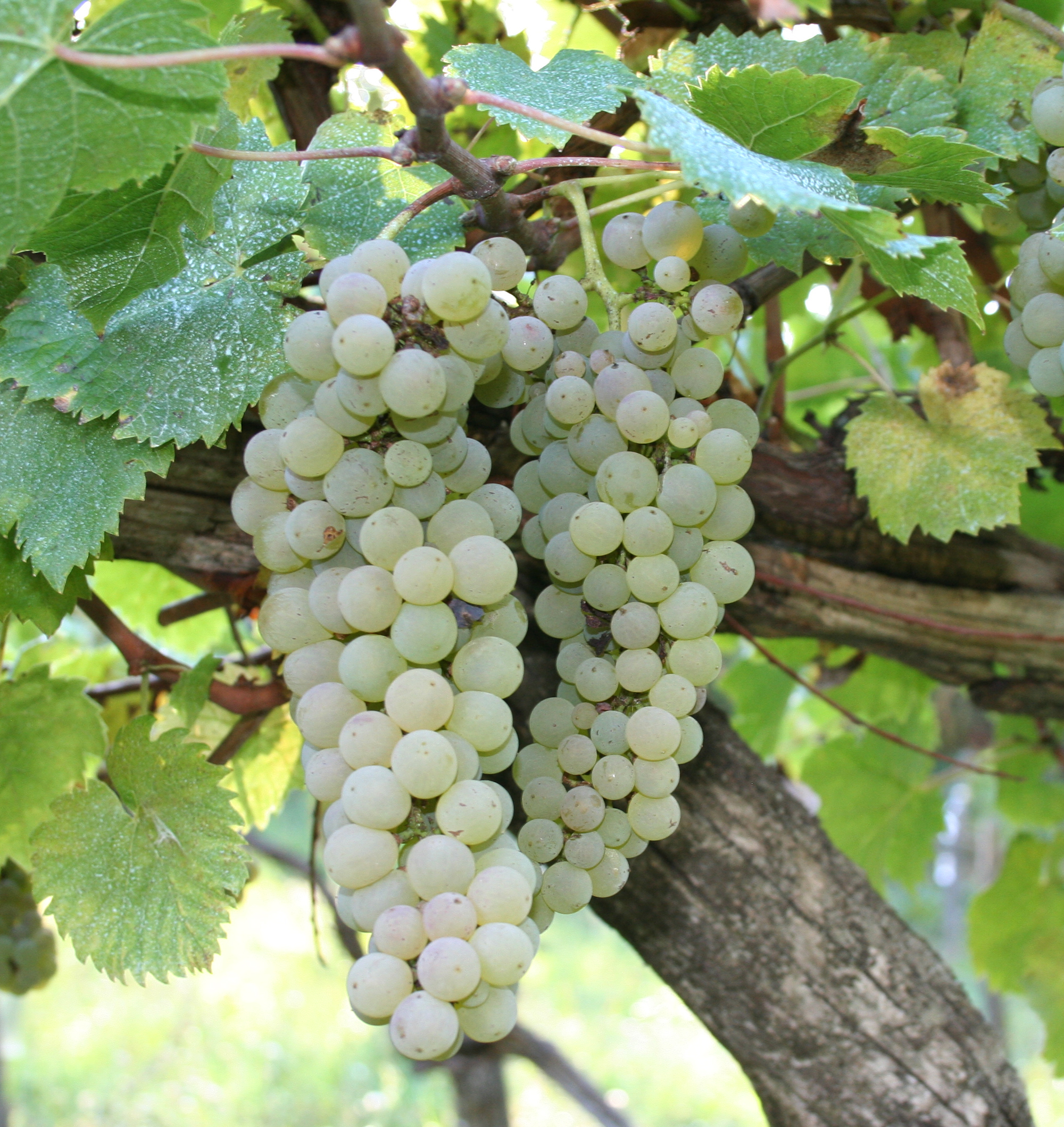 Grappoli di uva Pecorino di Arquata del Tronto. Un sentito ringraziamento a Giacomo Eupizi che accordandomi l'accesso alla sua vigna ha consentito lo scatto di questa immagine.